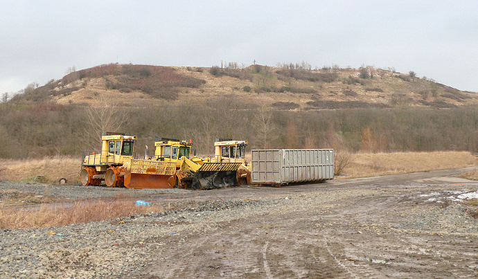 Abfallberg Monte Müllo auf der Mülldeponie Hanover-Lahe, vom Betriebsgelände von aha fotografiert